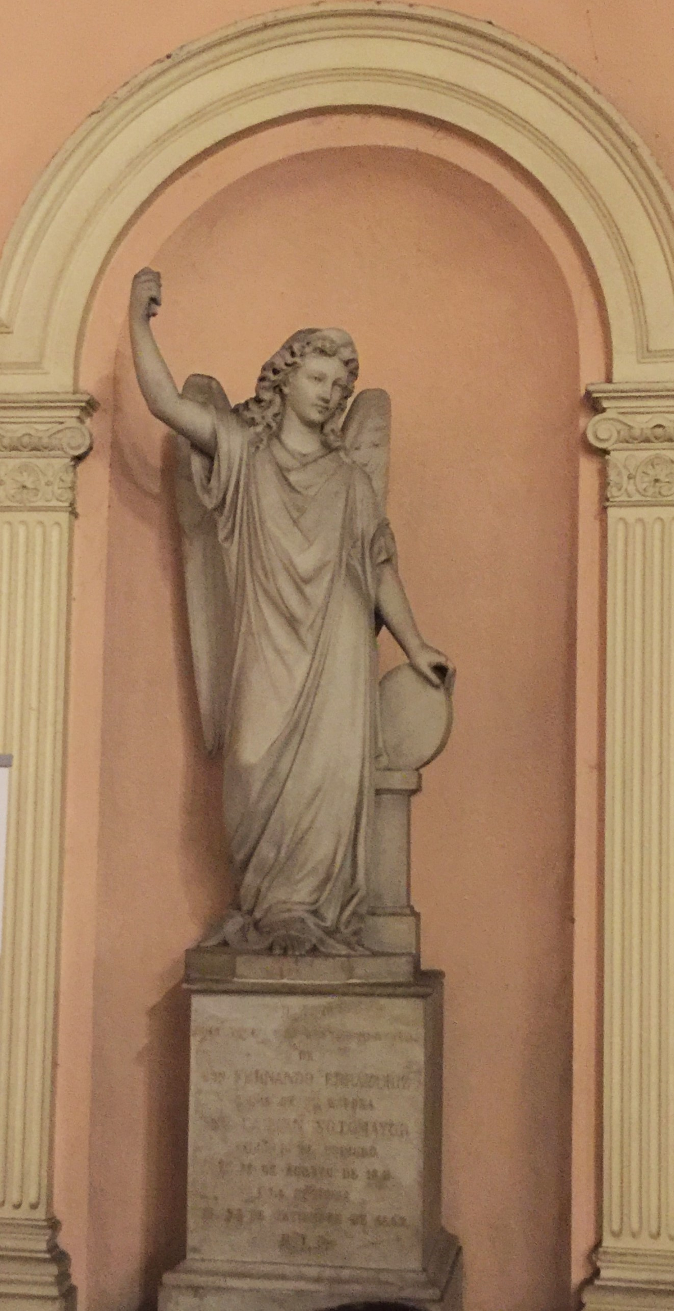 Fernando Errázuriz falleció el 16 de agosto de 1841 y fue sepultado en La Merced. Tres años más tarde, el 21 de septiembre de 1844 su viuda, Carmen Sotomayor, dispone del resto de sus bienes en forma extrajudicial. Su esposa Carmen Sotomayor falleció el 24 de septiembre de 1852. Ella y su esposo están enterrados juntos en el atrio de la Iglesia de la Merced, bajo un hermoso mausoleo, que tiene el siguiente epitafio: Aquí yacen los restos de Fernando Errázuriz y los de su esposa, Carmen Sotomayor.